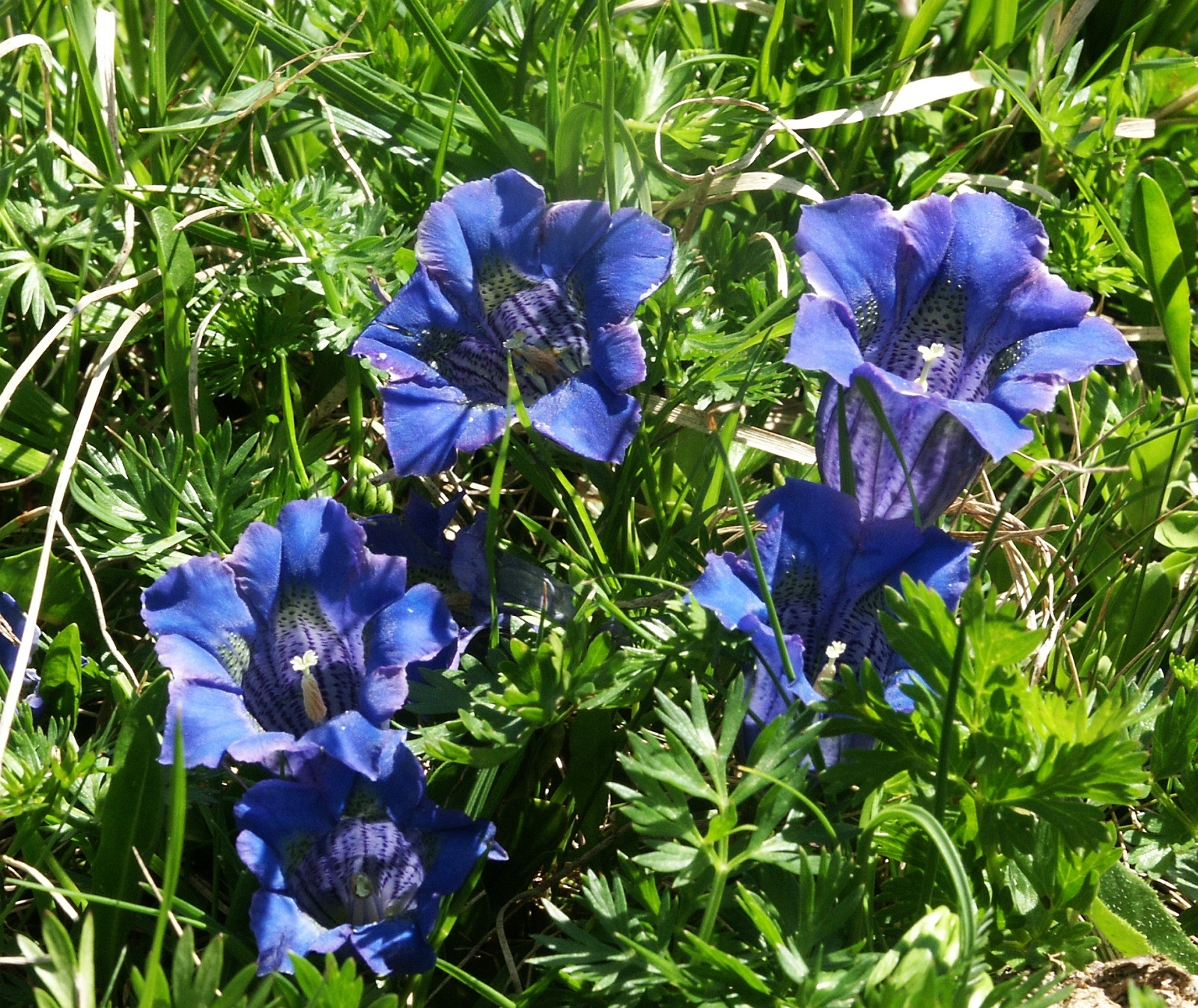 Gentiana acaulis, Zillertaler Alpen, Italy